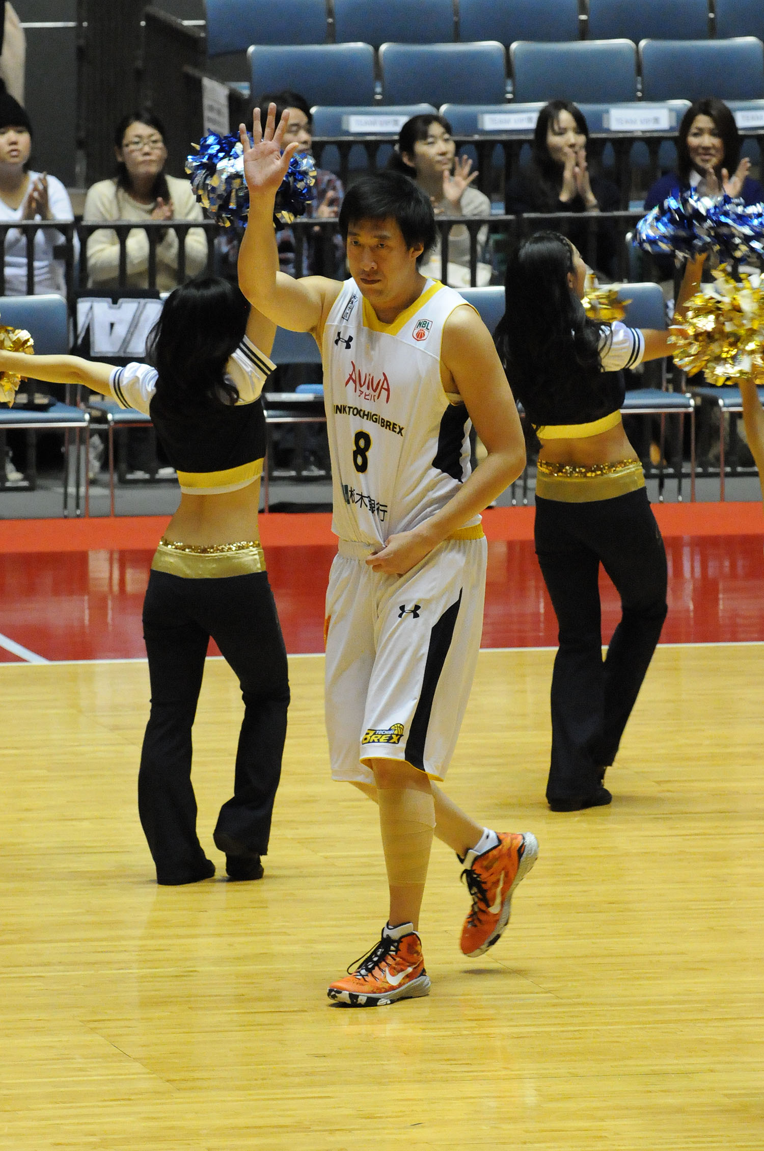 リンク栃木ブレックス、山田大治選手。代々木第一体育館で。